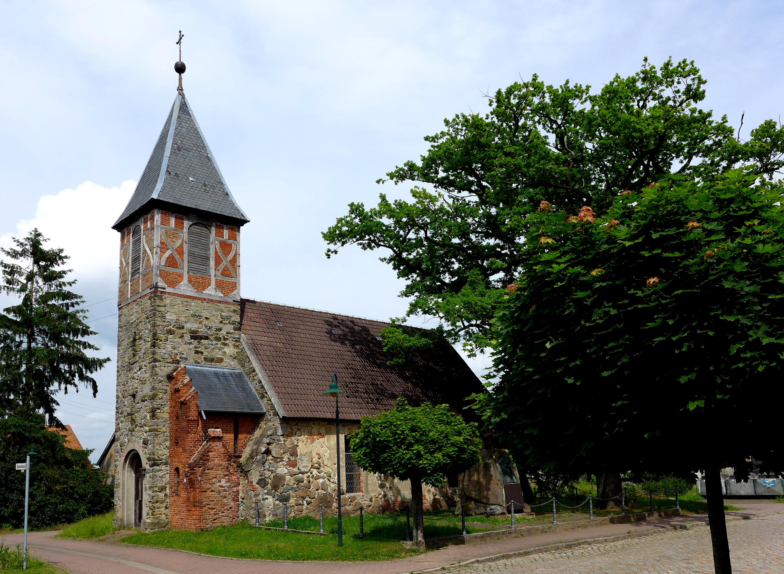 Barnebeck ist ein Ortsteil von Salzwedel. Feldsteinkirche aus dem 12. Jahrhundert, ursprünglich erbaut als Wehrkirche. Das Bild der Kirche hat sich im Laufe von Jahrhunderten durch An- und Umbauten verändert. Aufnahmedatum 2016-06.